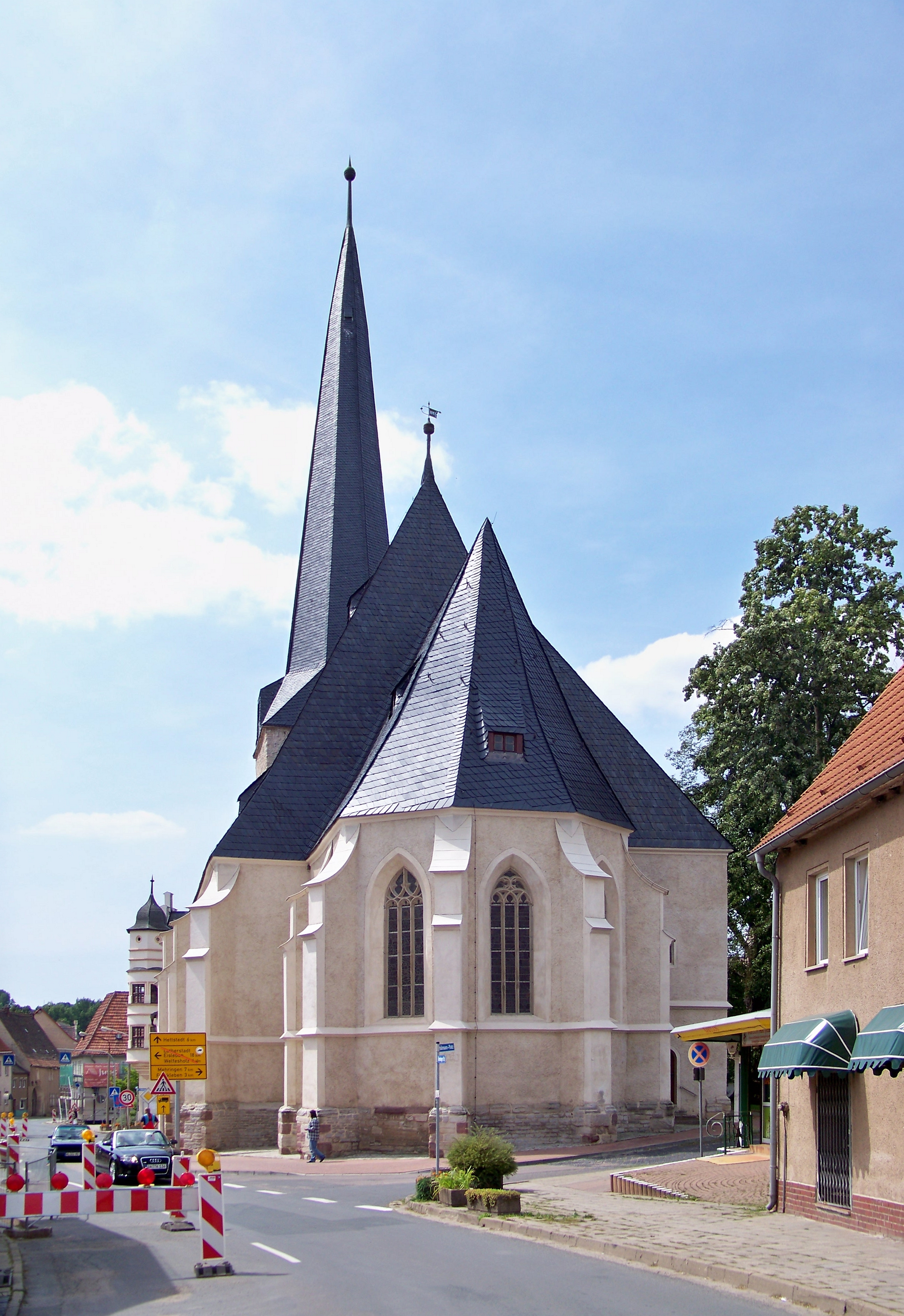 St. Marienkirche in Sandersleben (Anhalt)